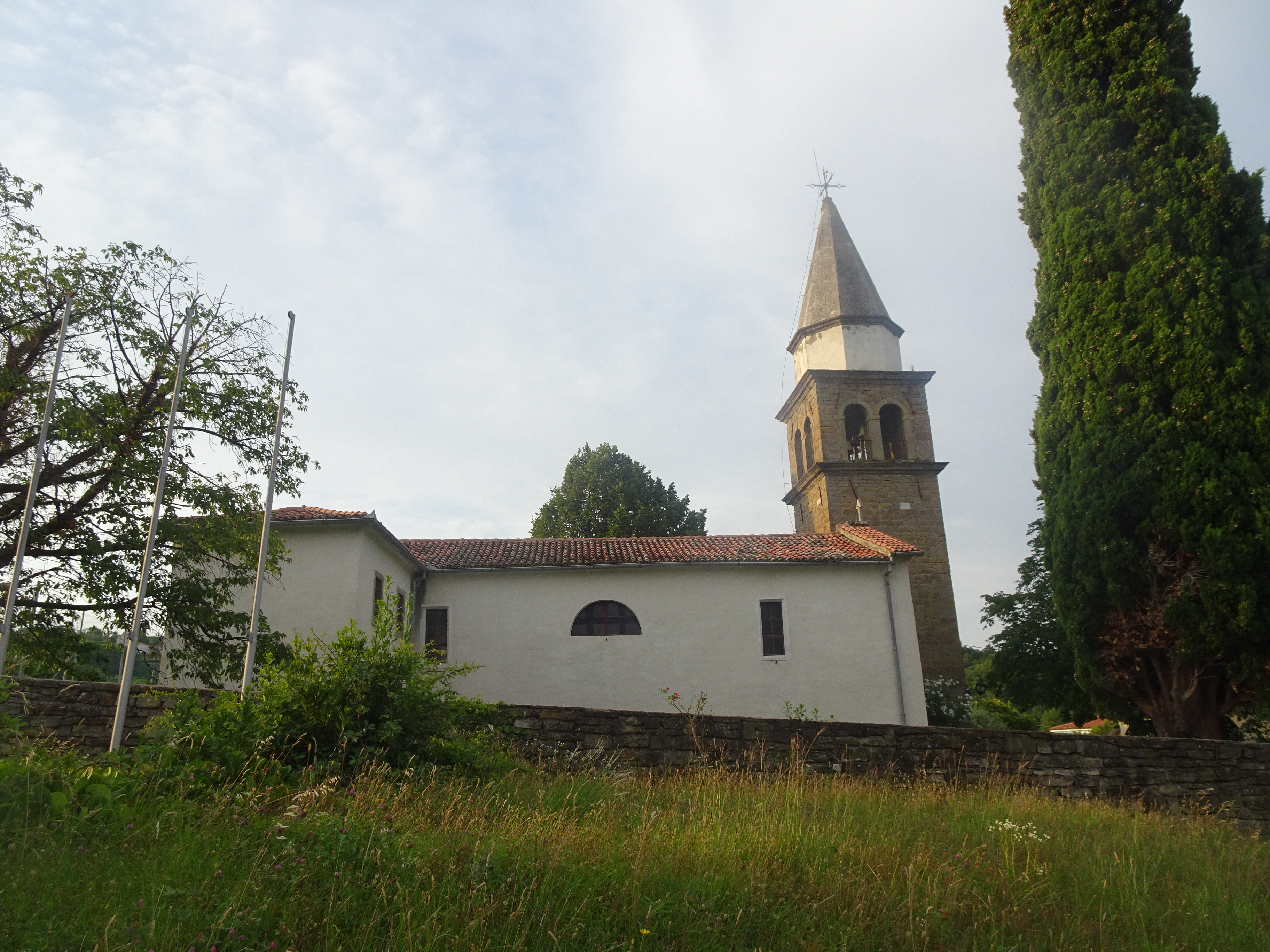 cerkev sv. Lucije, Plavje